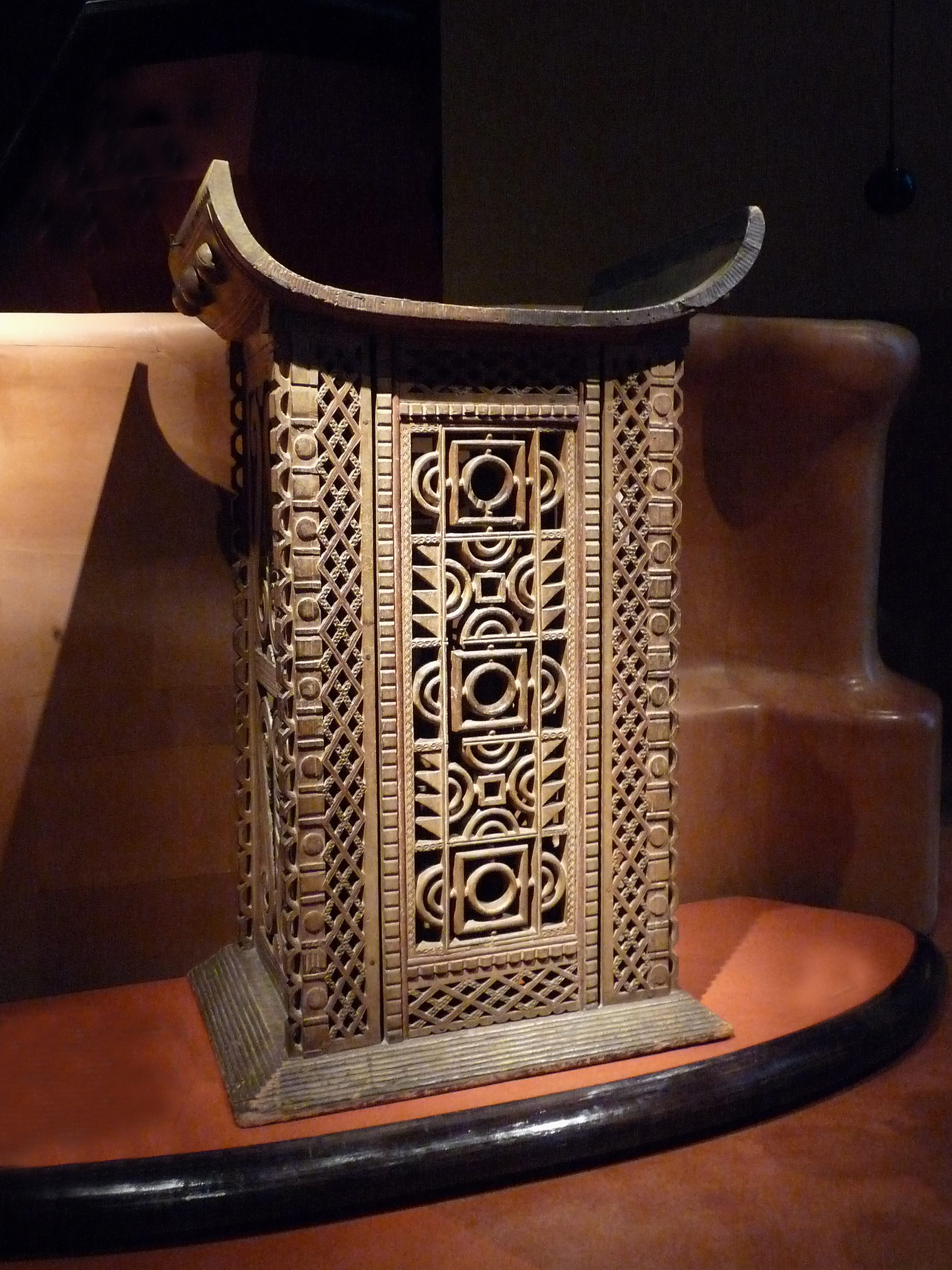 Royaume du Danhomè : trône du roi Ghézo. Atelier afro-brésilien ou portugais (?). Avant 1857. Musée du quai Branly.